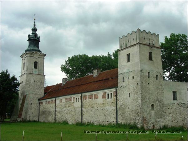 Baszta Attykowa i Krakowska